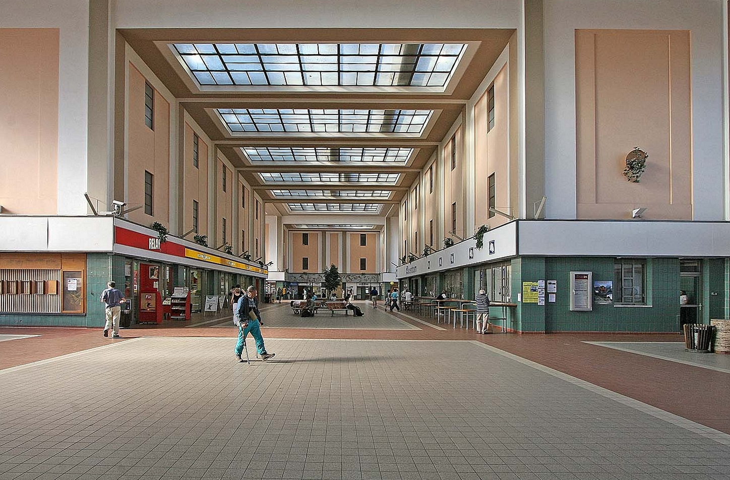 Hradec Králové - interiér hlavního nádraží